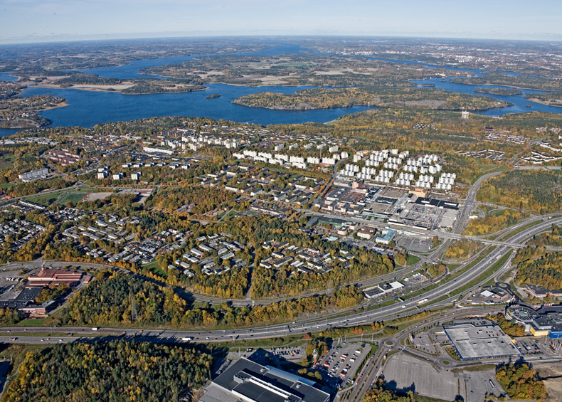 Skärholmen vid E4 mot N. IKEA-huset längst till höger i bildens mitt Motiv: Skärholmen Nyckelord: Flygbilder Kategori: Vägar, BostadsområdeSkärholmen vid E4 mot N. IKEA-huset längst till höger i bildens mitt.